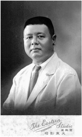 Picture of 施伯谟